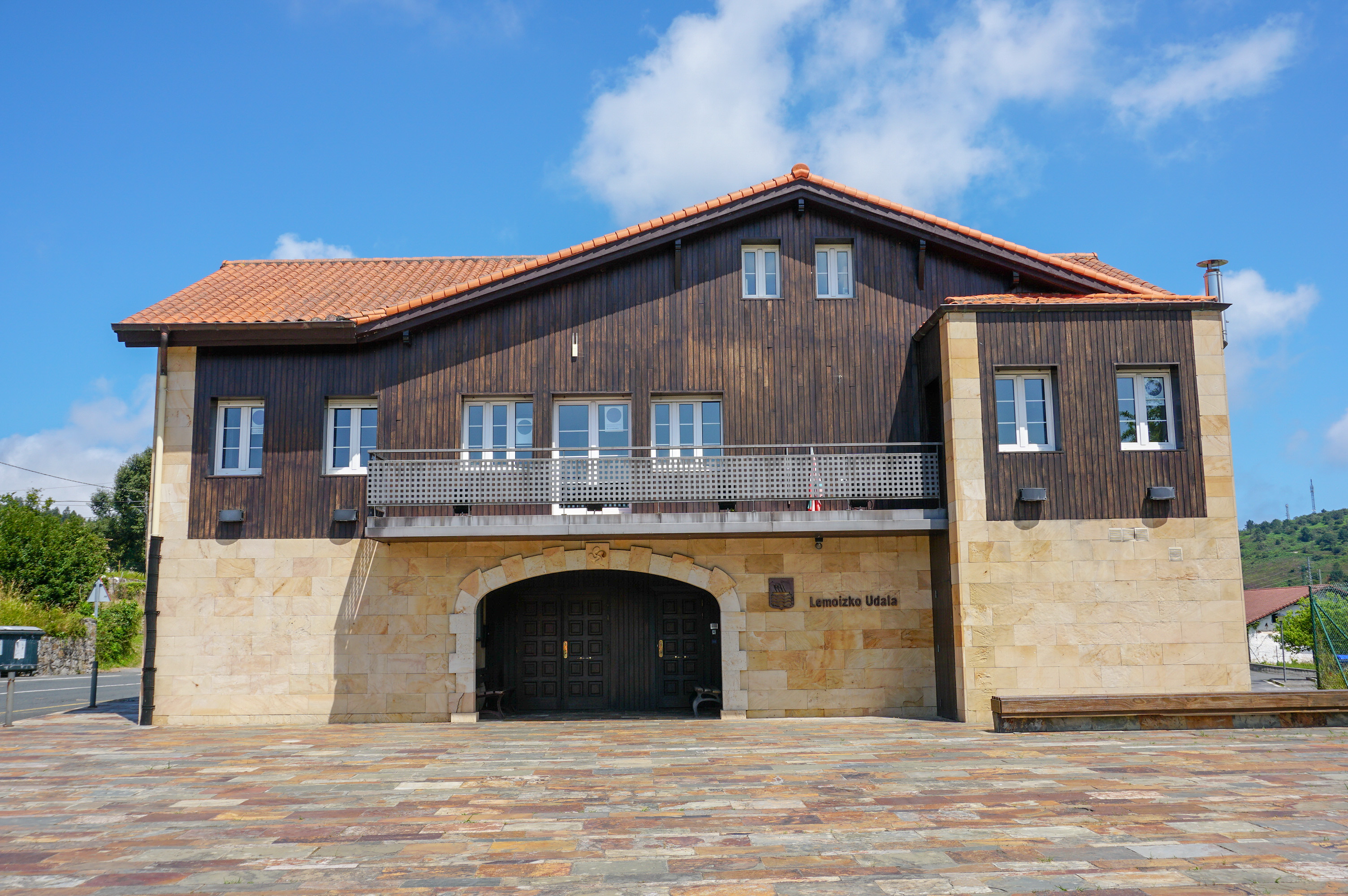 Casa consistorial de Lemoiz